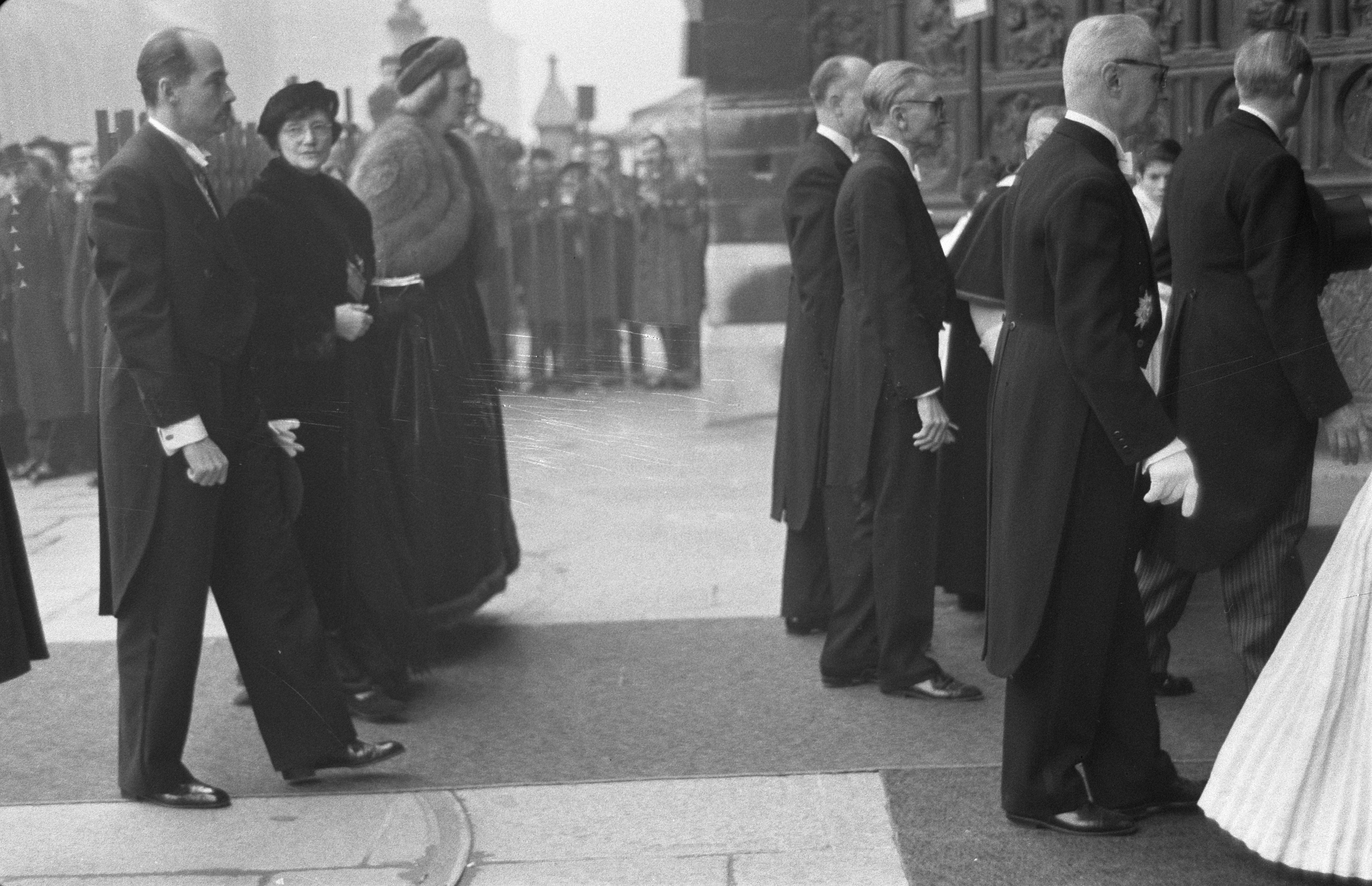 Collectie / Archief : Fotocollectie Anefo Reportage / Serie : [ onbekend ] Beschrijving : Huwelijk van Prinses Francoise van Bourbon Parma met Prins Eduard van Lobkowicz in Parijs Datum : 7 januari 1960 Locatie : Frankrijk, Parijs Trefwoorden : huwelijken Persoonsnaam : Prins Eduard van Lobkowicz Fotograaf : Pot, Harry / Anefo Auteursrechthebbende : Nationaal Archief Materiaalsoort : Negatief (zwart/wit) Nummer archiefinventaris : bekijk toegang 2.24.01.05 Bestanddeelnummer : 910-9258